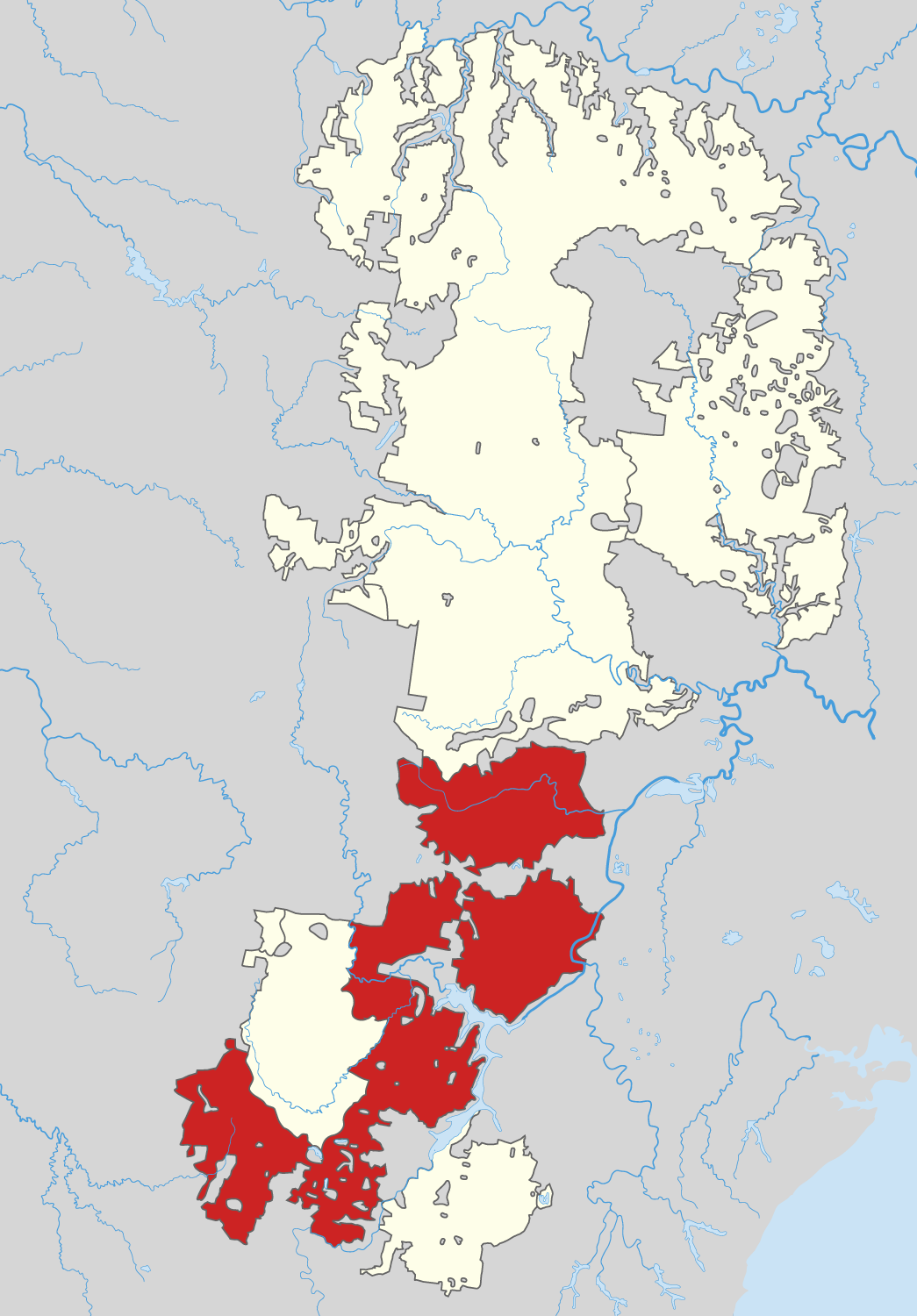 Lage des Blue Mountains National-Park im Blue Mountains Weltnaturerbe.